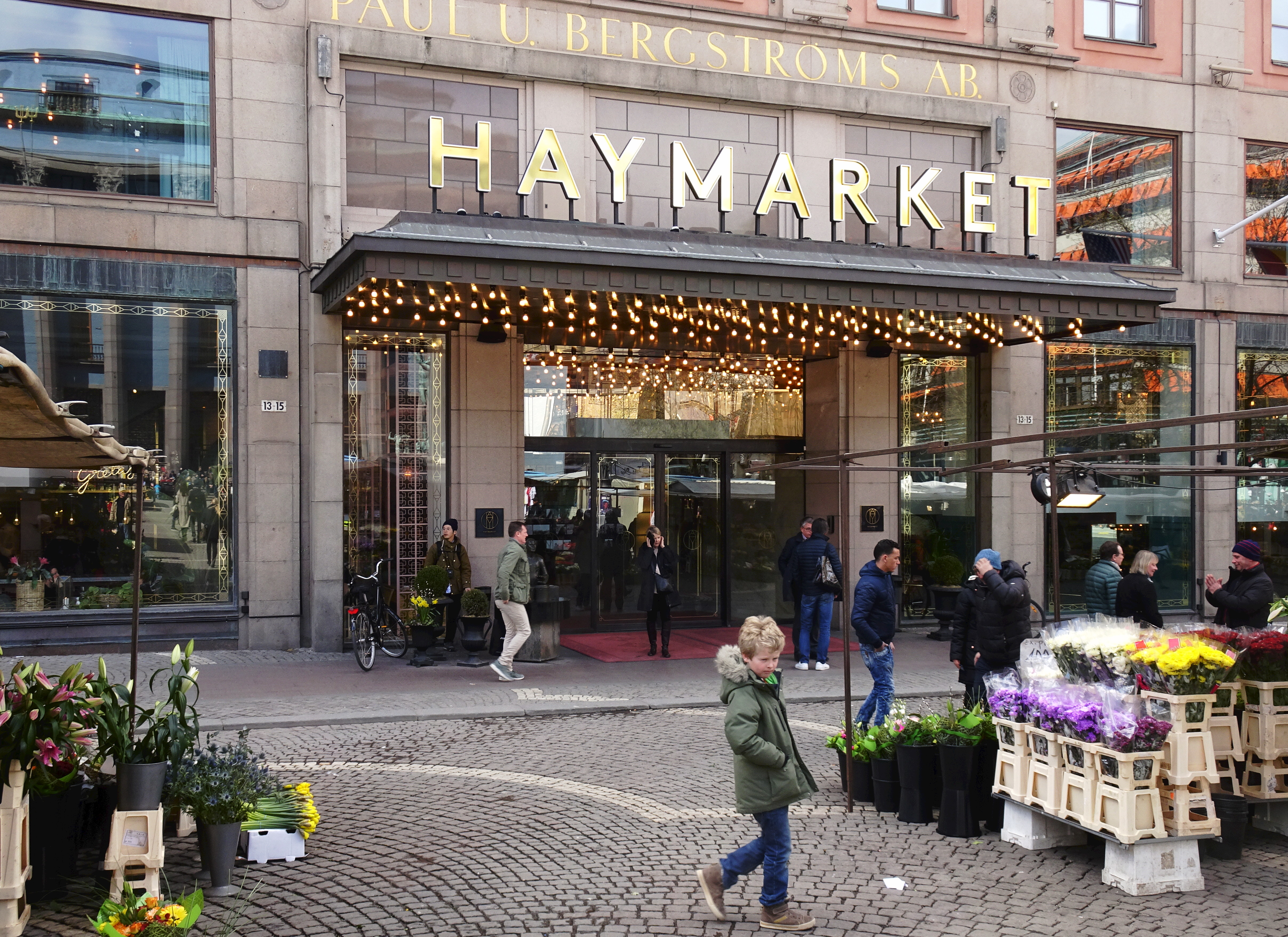 Hotell Haymarket, Stockholm, ingång från Hötorget